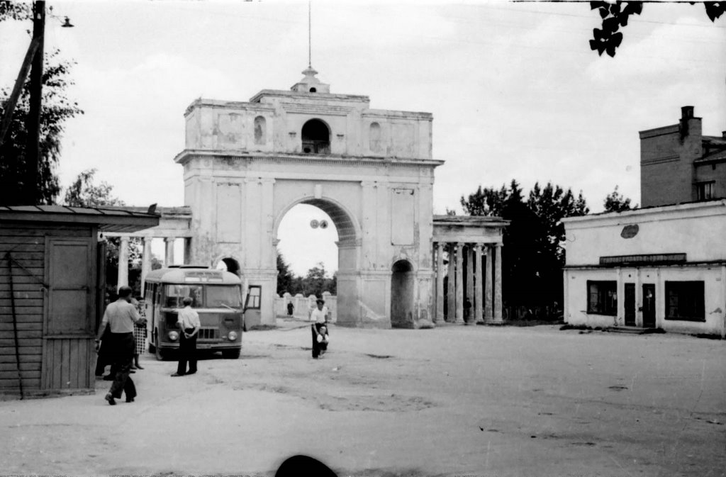 Беларуская (тарашкевіца): Маладэчна, Трыюмфальная брама пры саветах